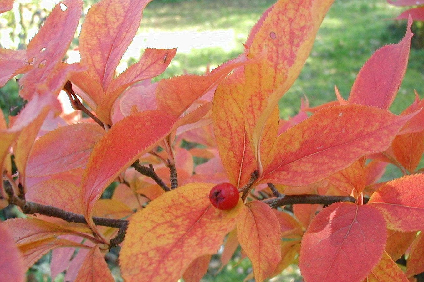 Photinia villosa: Foliage in autumn colouring